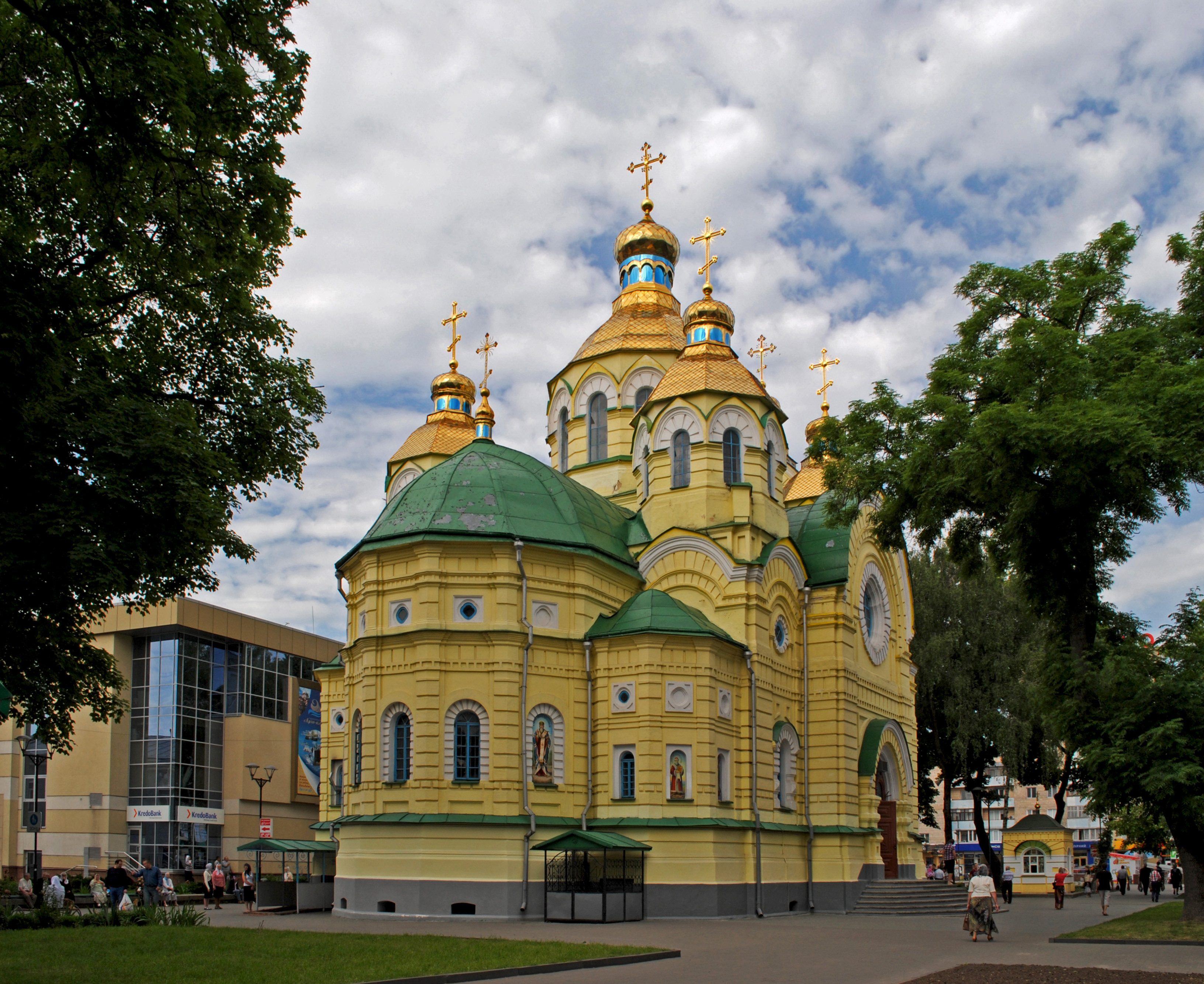 Воскресенський собор (мур.), Рівне, вул.Соборна